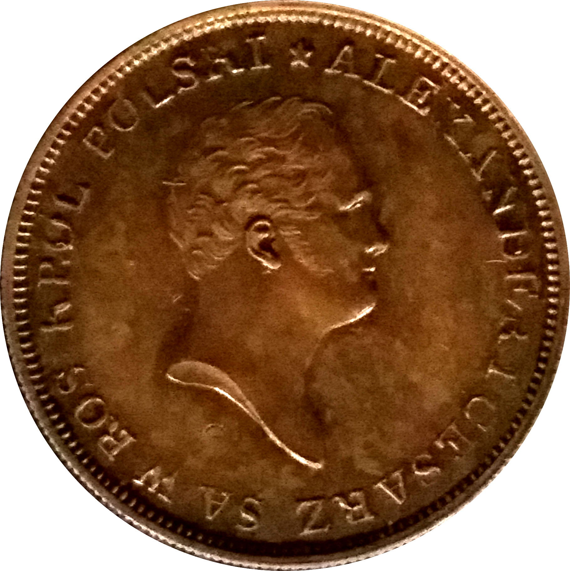 1 złoty polski 1818 z otokiem